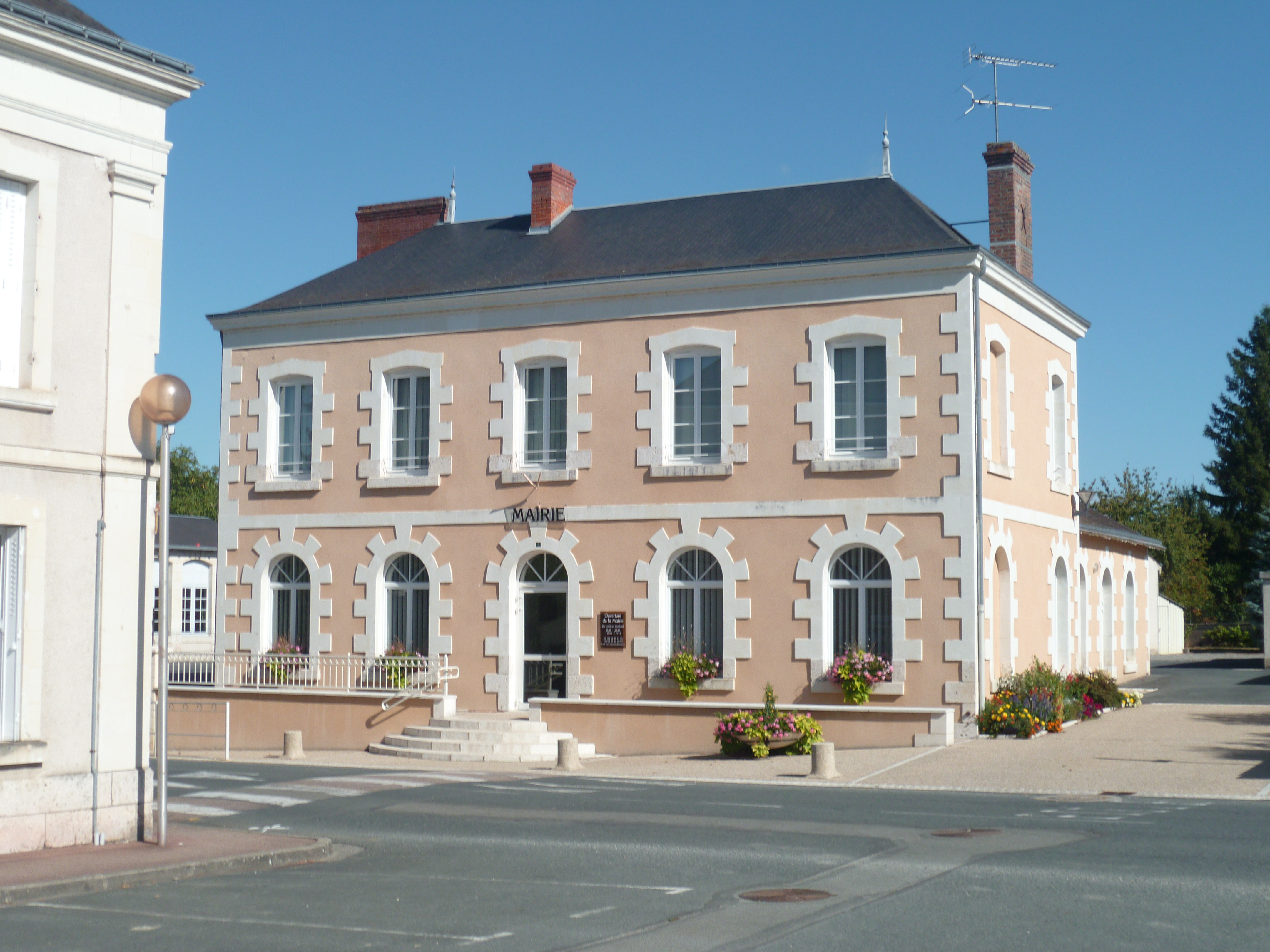 Mairie de Vicq Sur Nahon